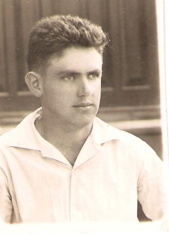 חיים הרברט לטה